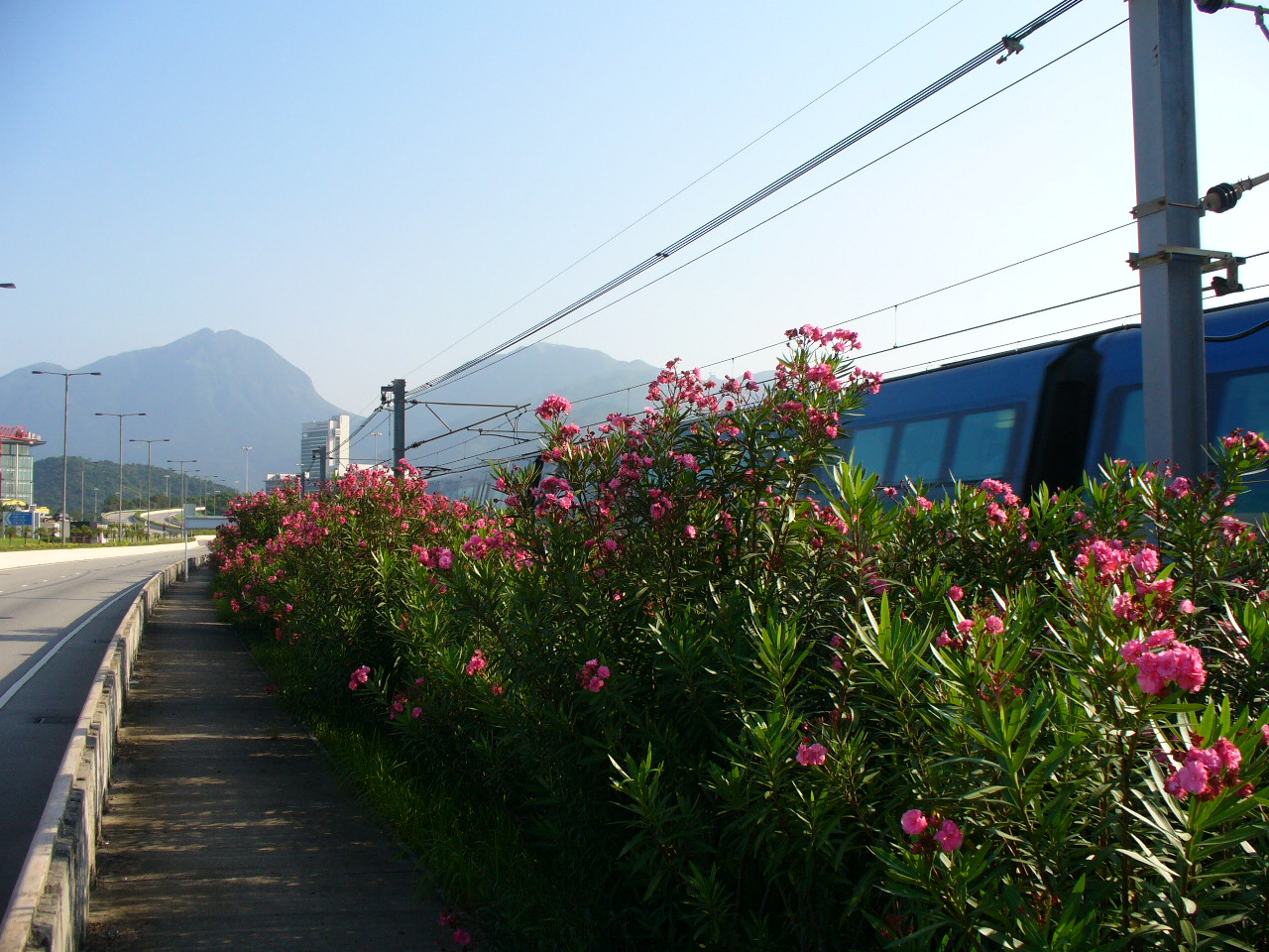 中文（香港）: 東岸路與機場快綫